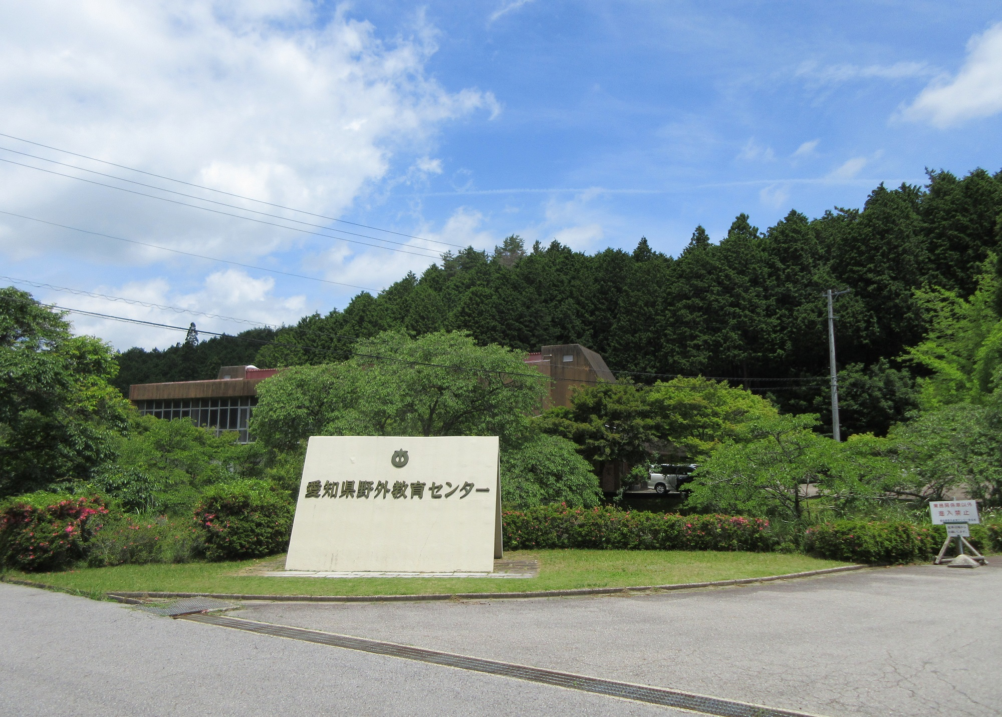 愛知県野外教育センター（岡崎市千万町町）